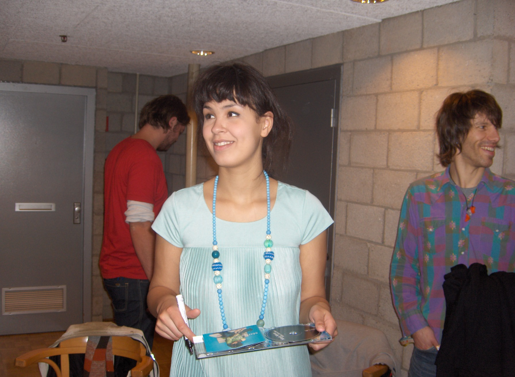 Maria Mena in Utrecht, signeersessie na de show in Vredenburg.